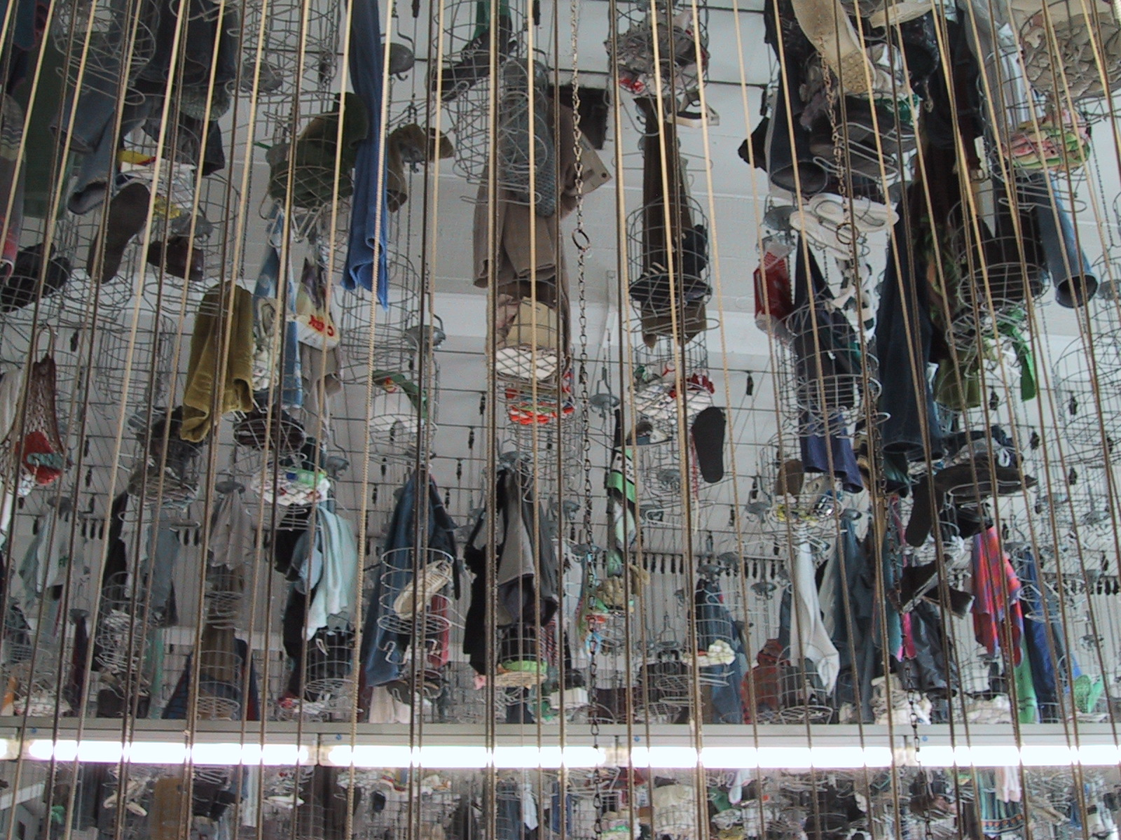 Sogenannte Weißkaue in einem Bergwerk A dressing room for miners Date: October 2001, Rheinberg, Kreis Wesel, Germany Author: Maschinenjunge Licence: see below.